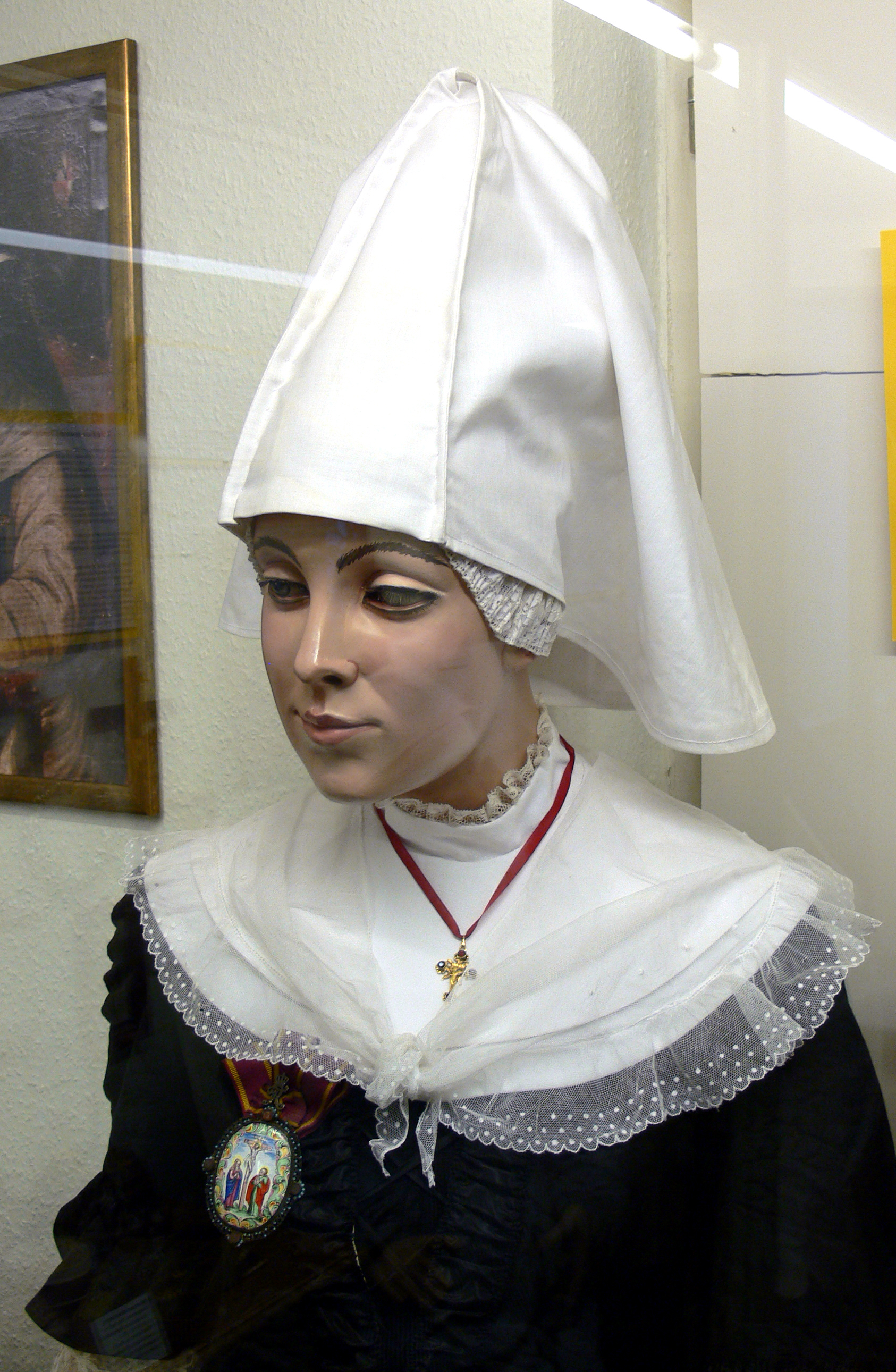 Weingarten, Museum für Klosterkultur, Figurine einer klösterlichen Stiftsdame (Ordenstracht um 1760, Rekonstruktion); Reifrockrobe mit Überrock, Schweifmantel, weißer Kragen mit Spitzenfichu, Spitzenärmelbesatz, Stiftsabzeichen, weißer Kopffächel